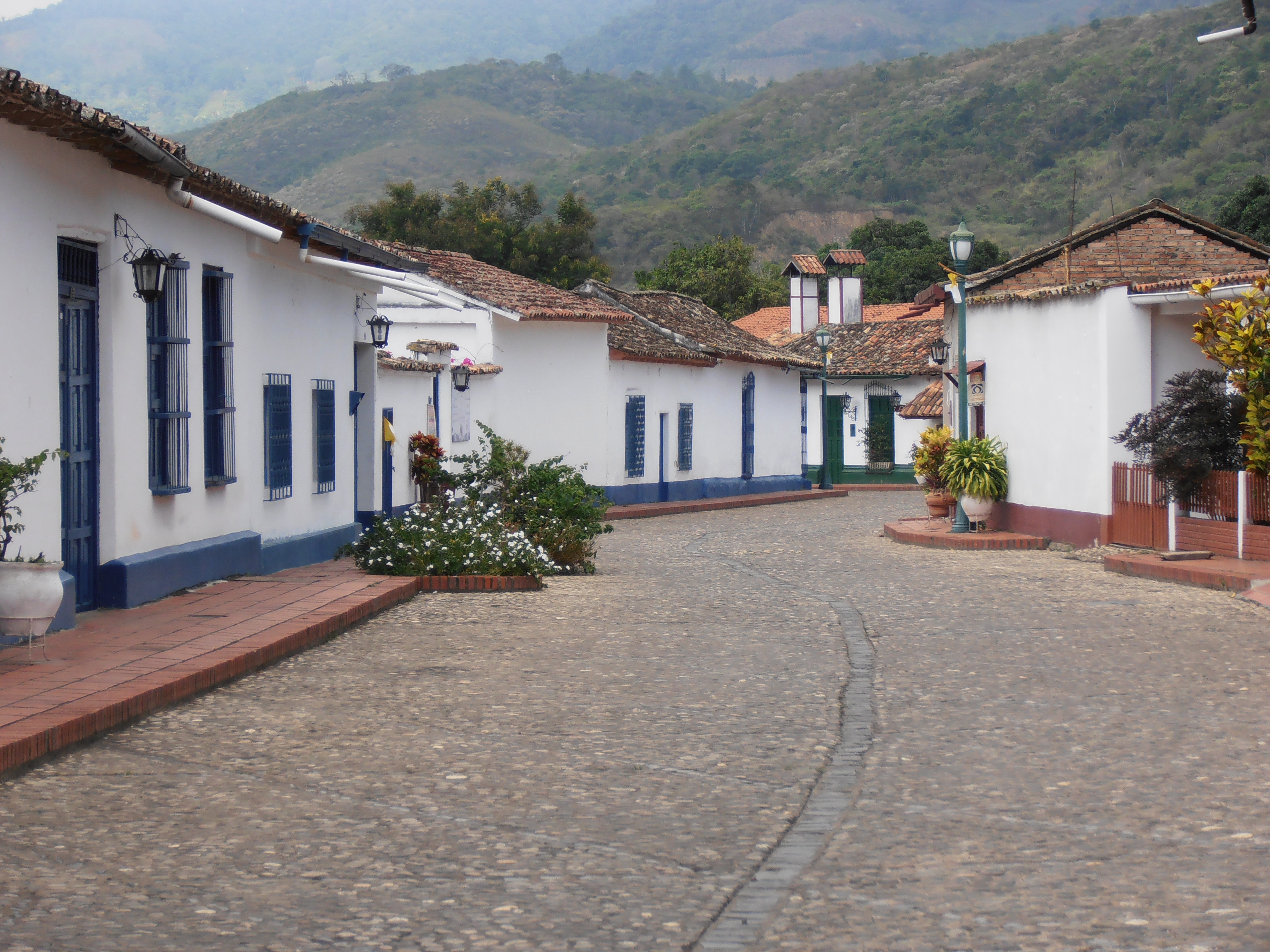 Calles empedradas y casas coloniales en San Pedro del Rio - Estado Táchira